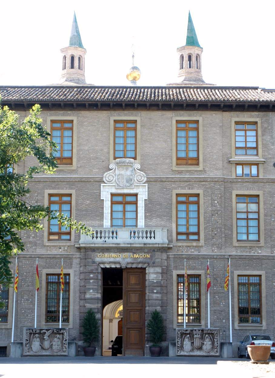 Diputación General de Aragón o Gobierno de Aragón. Tiene su sede en la Real Casa de la Misericordia, también conocida como El Pignatelli